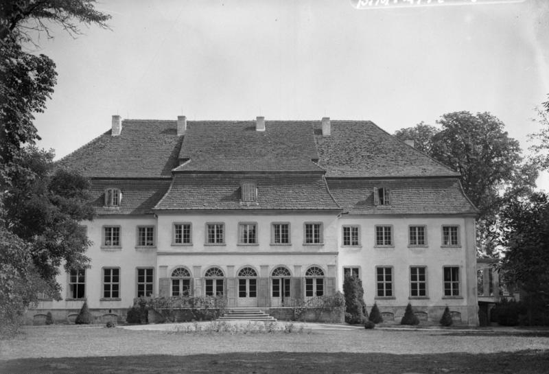 Harnekop: SA Führerschule: Vorderansicht